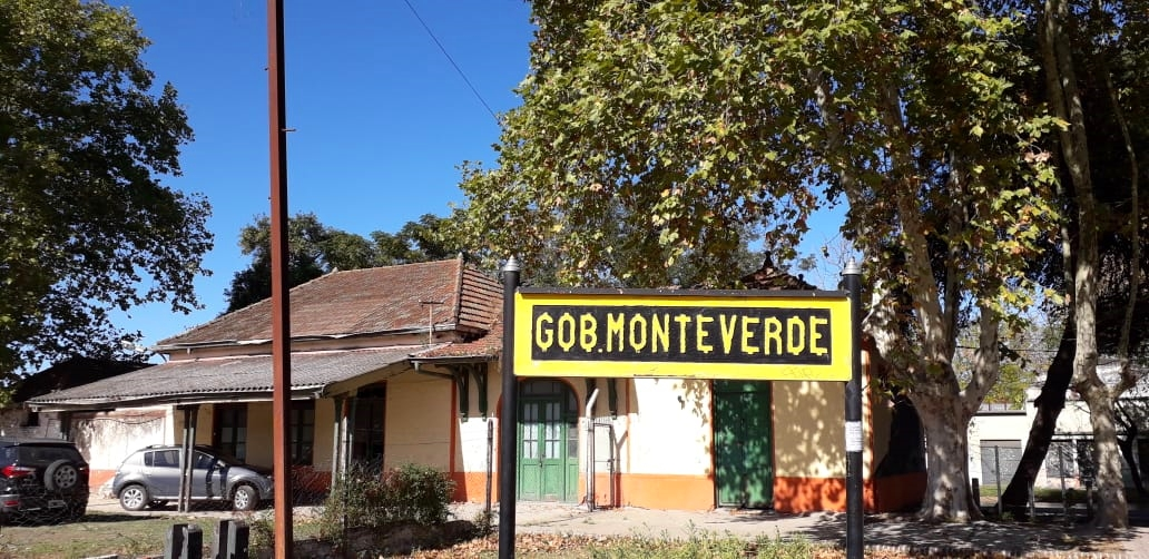 Florencio Varela